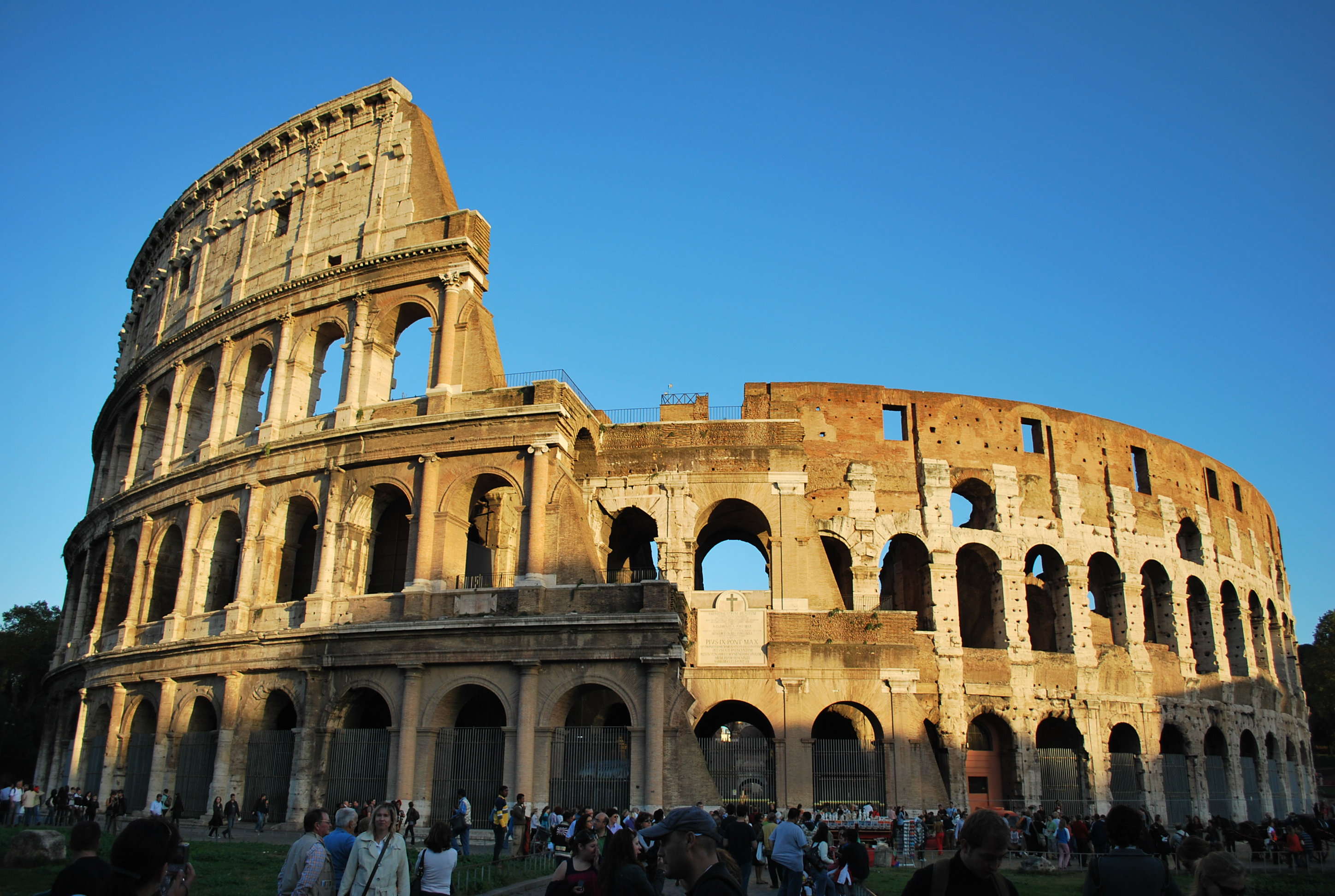 Colosseo, Roma